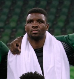 Nigeria national football team